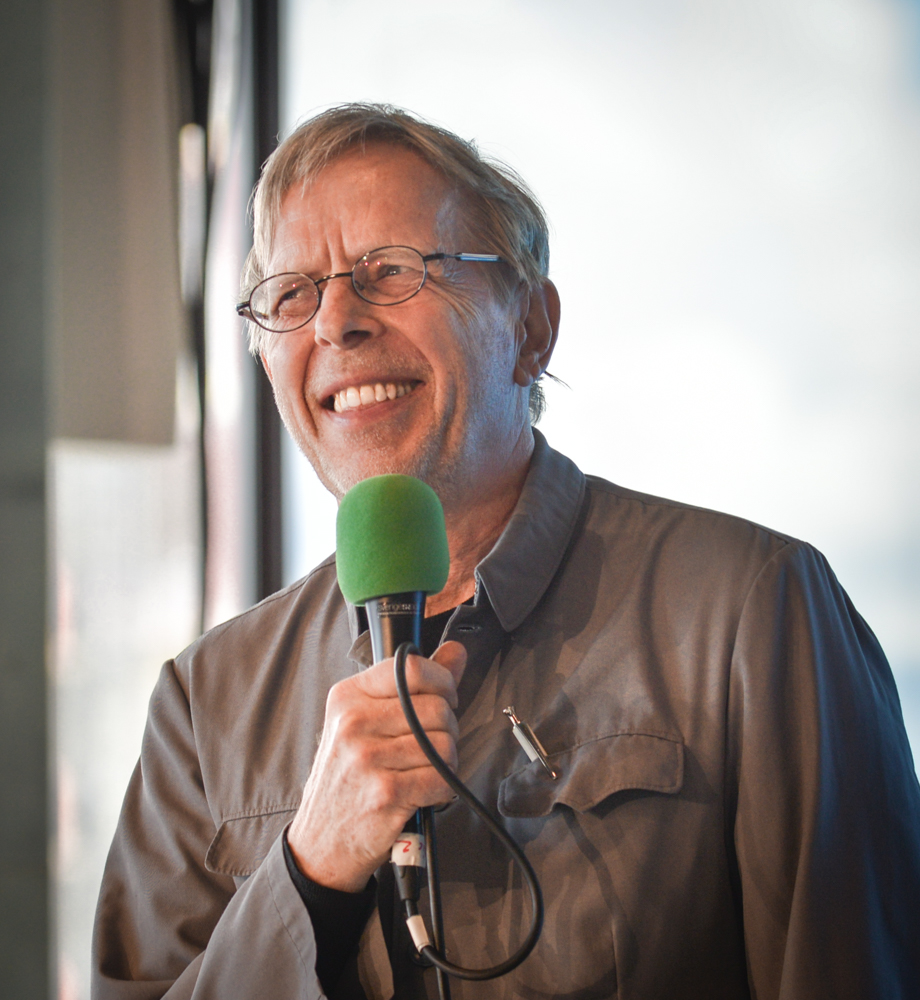 Göran Sommardal den 26 april 2018 på Kulturhuset Stadsteatern i Stockholm i samband med en direktsändning av SR P1 Nordegren & Epstein.